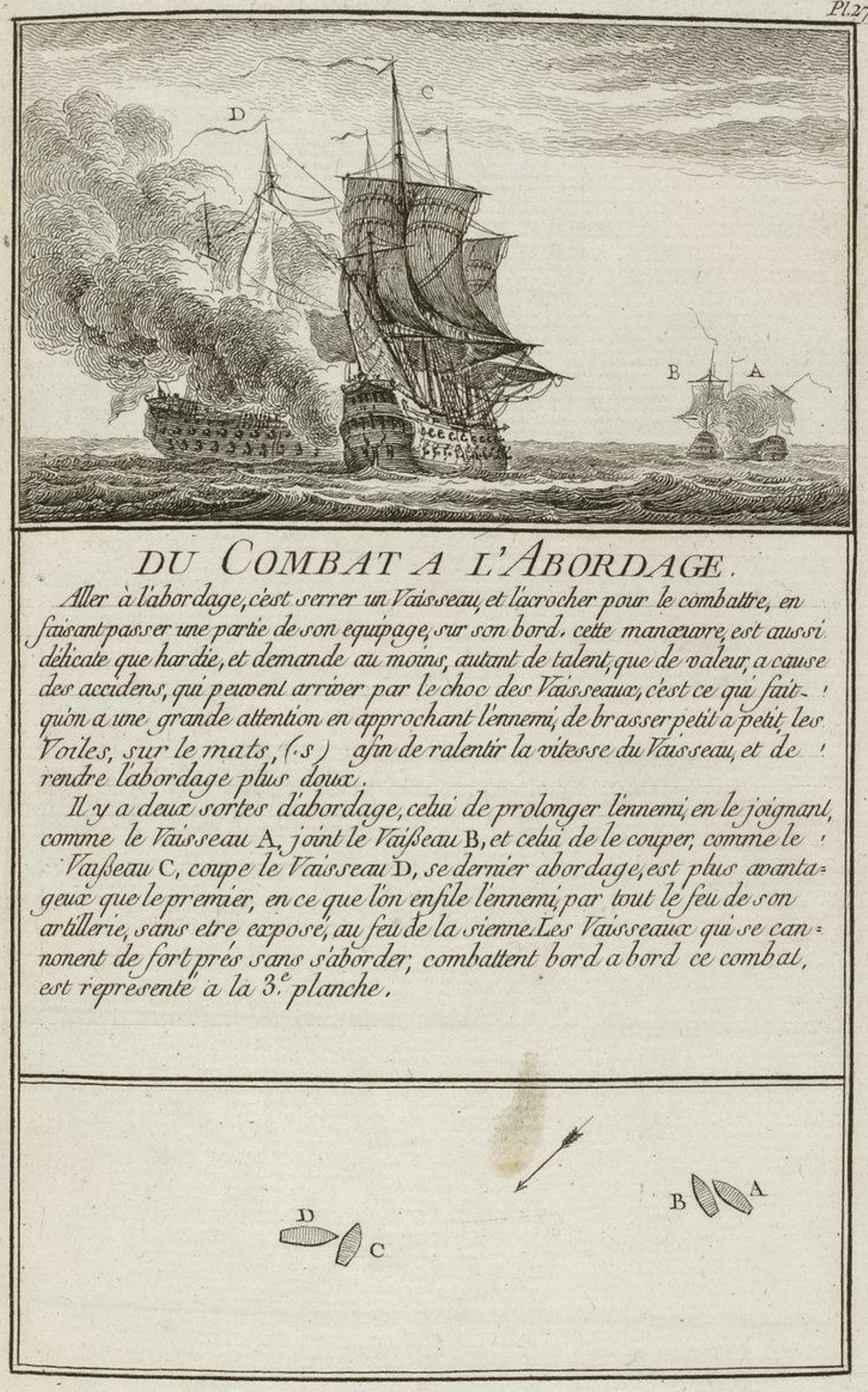 Représentation d'un combat à l'abordage et des techniques utilisées pour cela tiré de Marine militaire, ou Recueil des différents vaisseaux qui servent à la guerre, suivis des manœuvres qui ont le plus de rapport au combat ainsi qu'à l'attaque et la défense des ports par N. Ozanne.